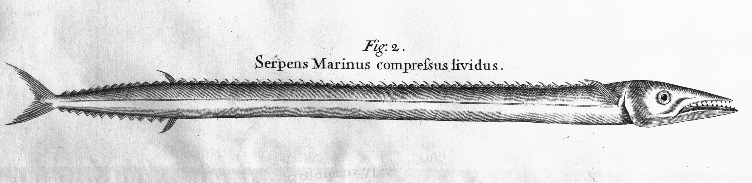 Serpens Marinus compressus lividus: detalle de la figura 2, Tabla 1, Vol. 1, de la obra "A voyage to the islands Madera, Barbados, Nieves, S. Christophers and Jamaica", de Sir Hans Sloane y Michael van der Gucht (1707)